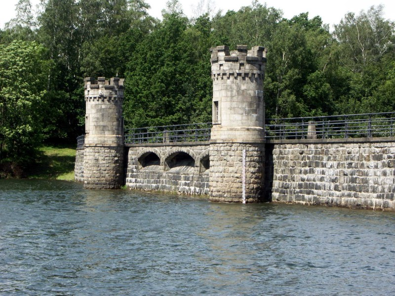 prehrada fojtka